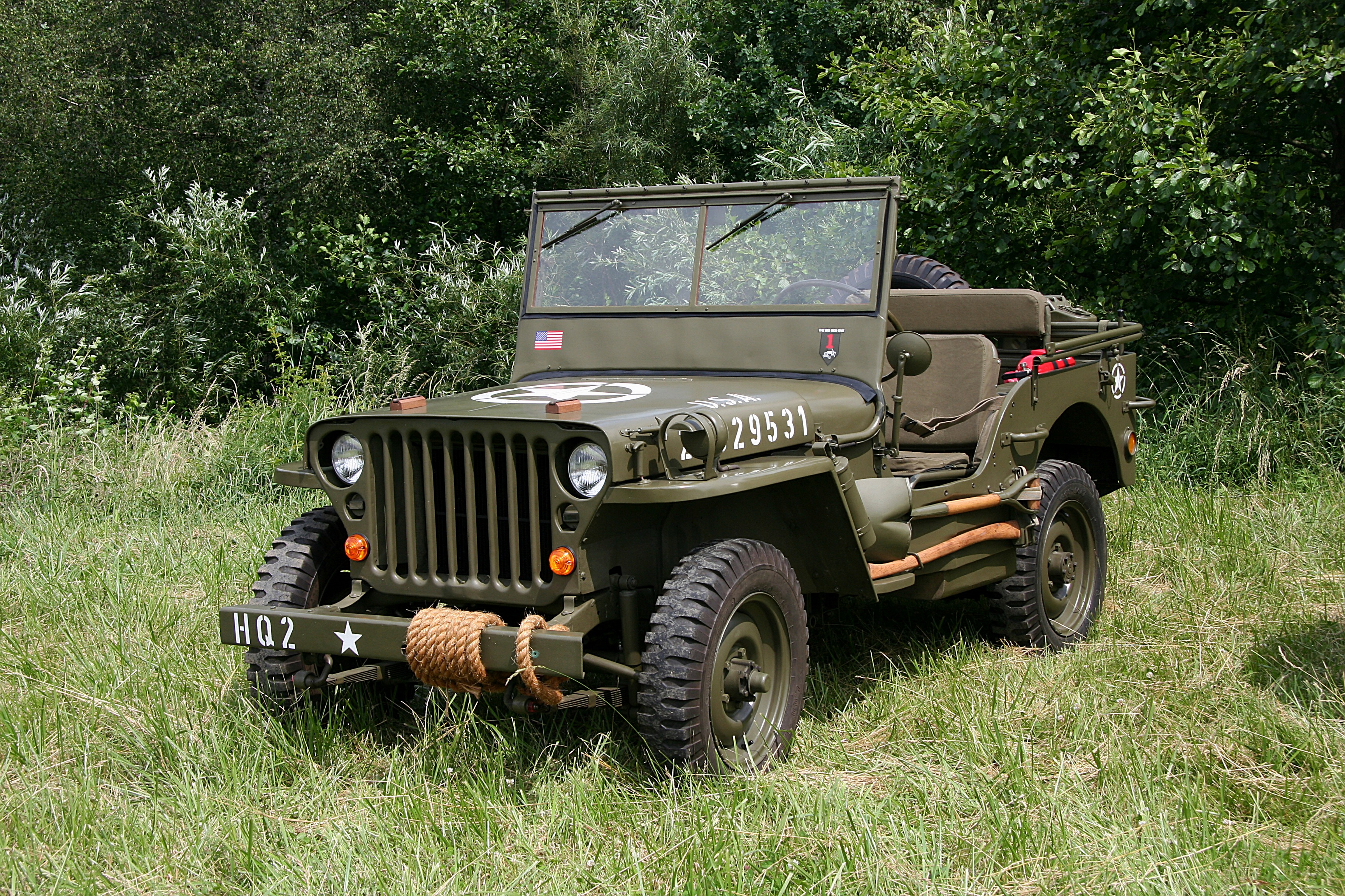 Willys MB, Baujahr 1944